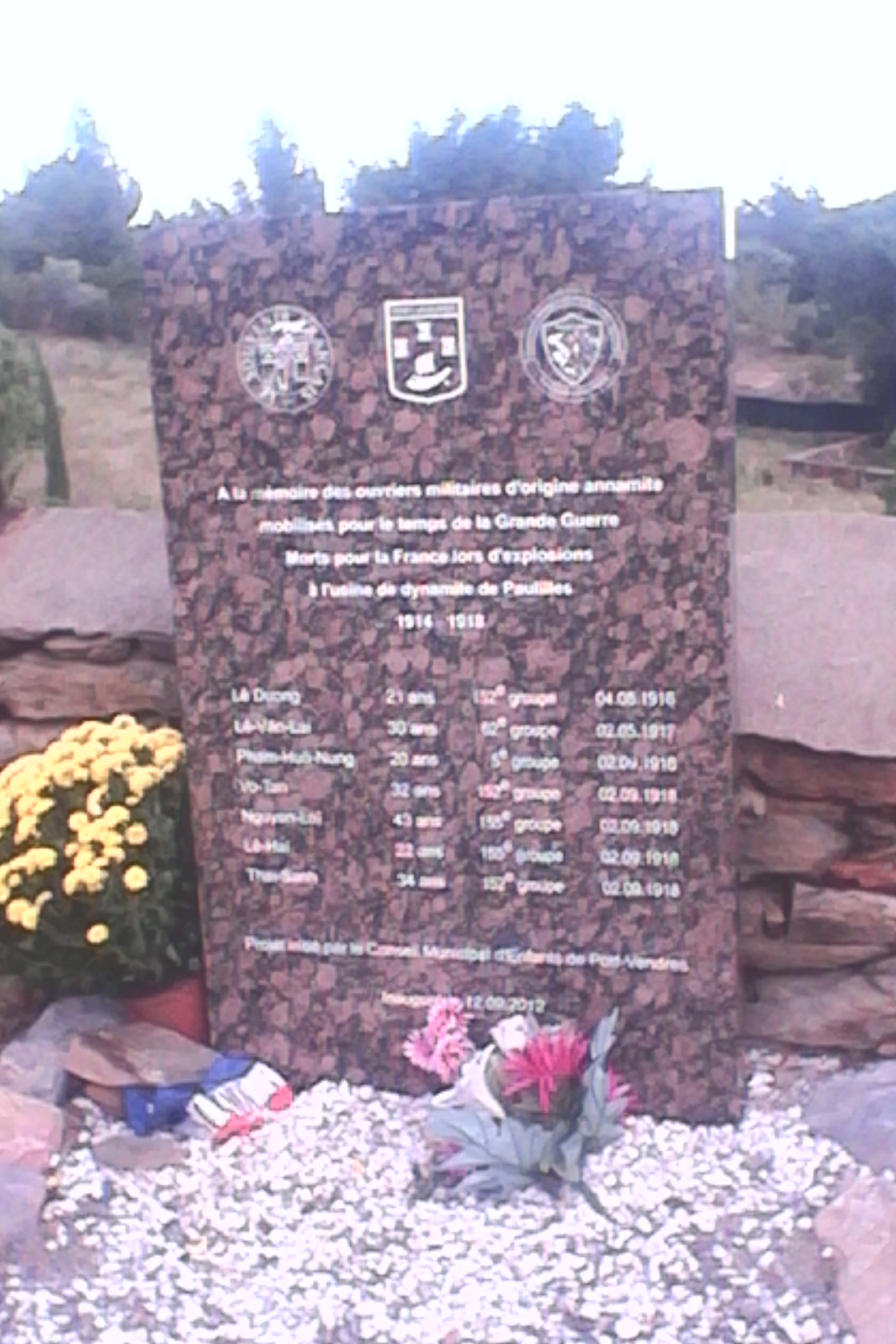 Plaque commémorative en hommage aux travailleurs annamites (Indochine française) morts à l'usine de dynamites de Paulilles (Pyrénées-Orientales) durant la première guerre mondiale. « A la mémoire des ouvriers militaires d'origine annamite mobilisés pour le temps de la Grande Guerre. Morts pour la France lors d'explosions à l'usine de dynamite de Paulilles. 1914-1918 »